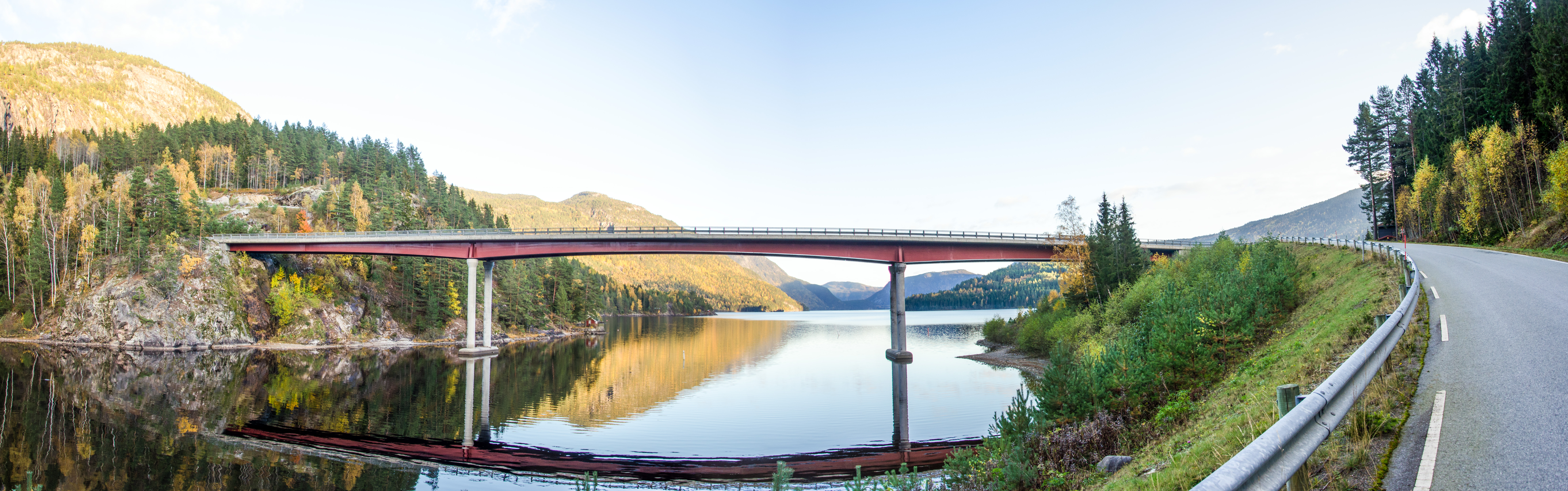 Kviteseid bru